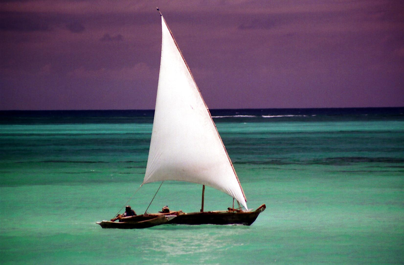 Zanzibar Kiwengwa Beach